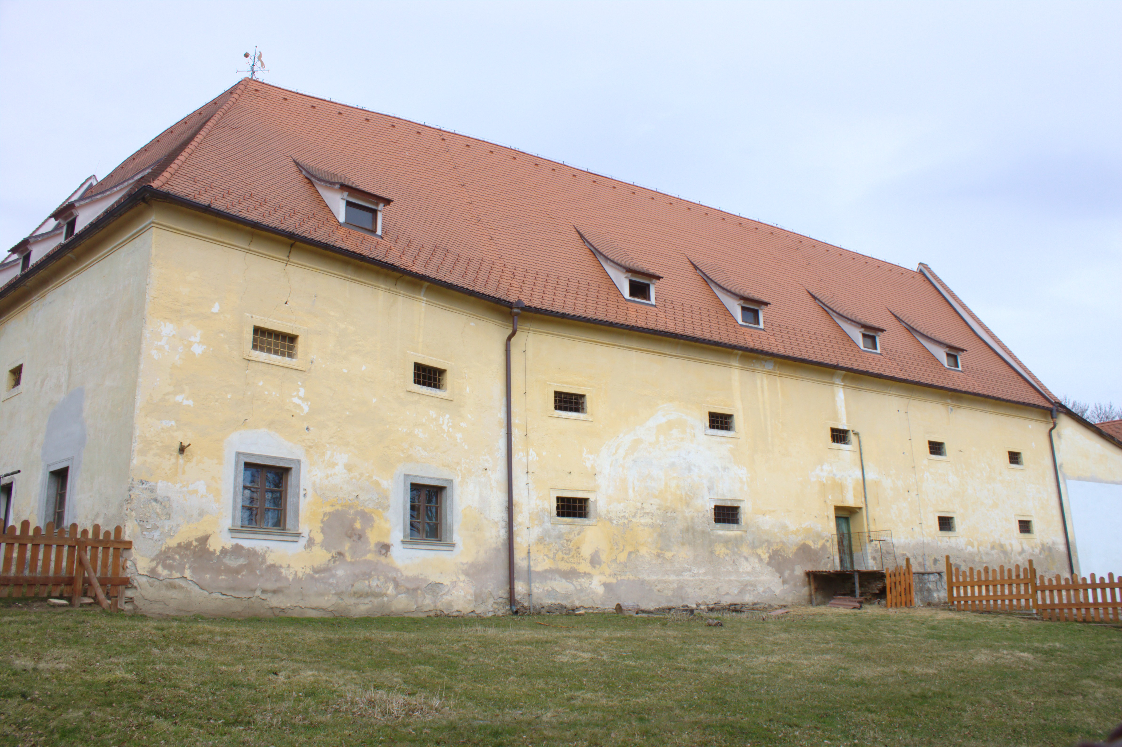 Tvrz ve vesnici Chlum Project: Fotíme Česko